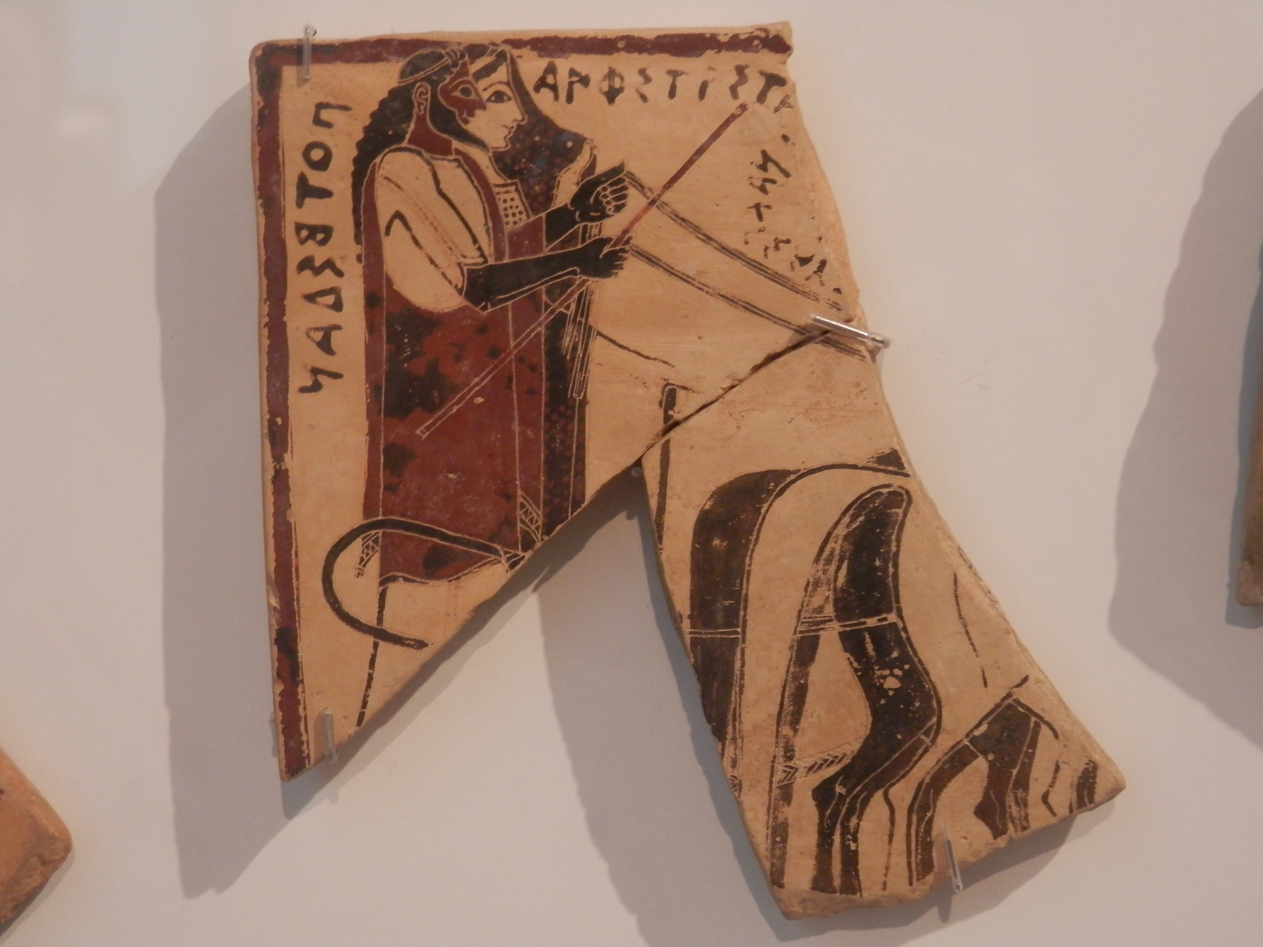 Poseidón